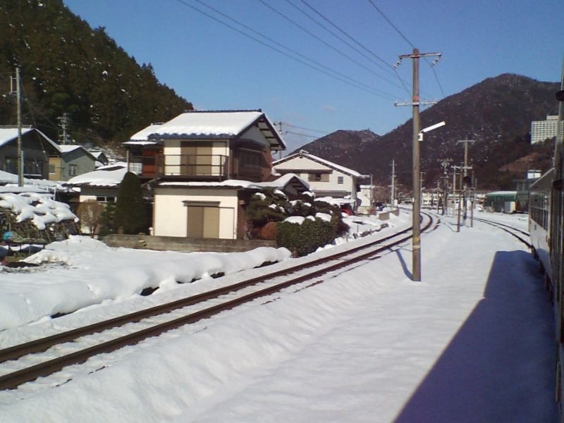 小ヶ野信号場（下呂方向） 撮影者：tamikiku 撮影日時：2005.12.31 10:09 高山本線1712C車窓より撮影